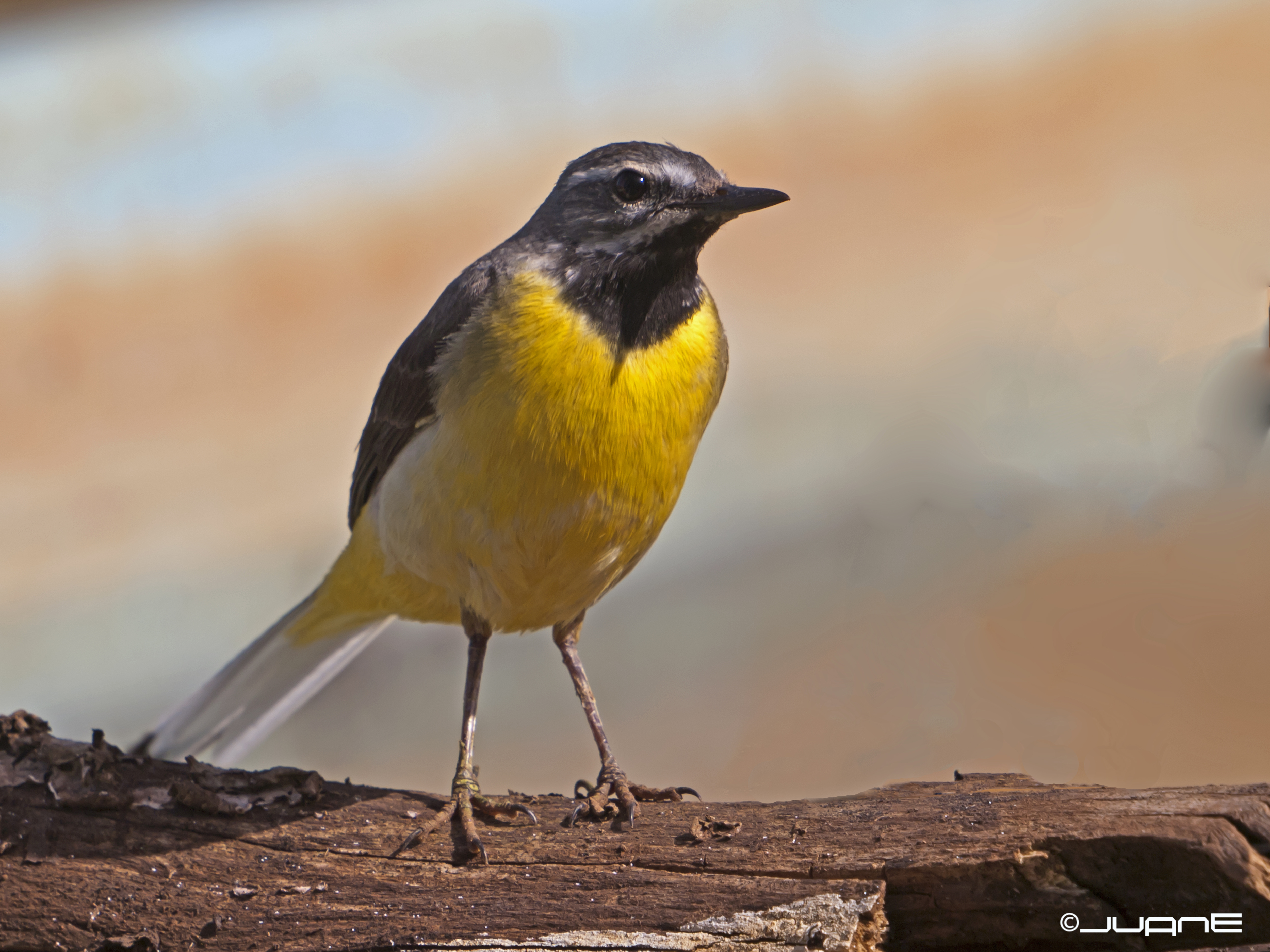 Alpispa (Motacilla cinerea canariensis)♂